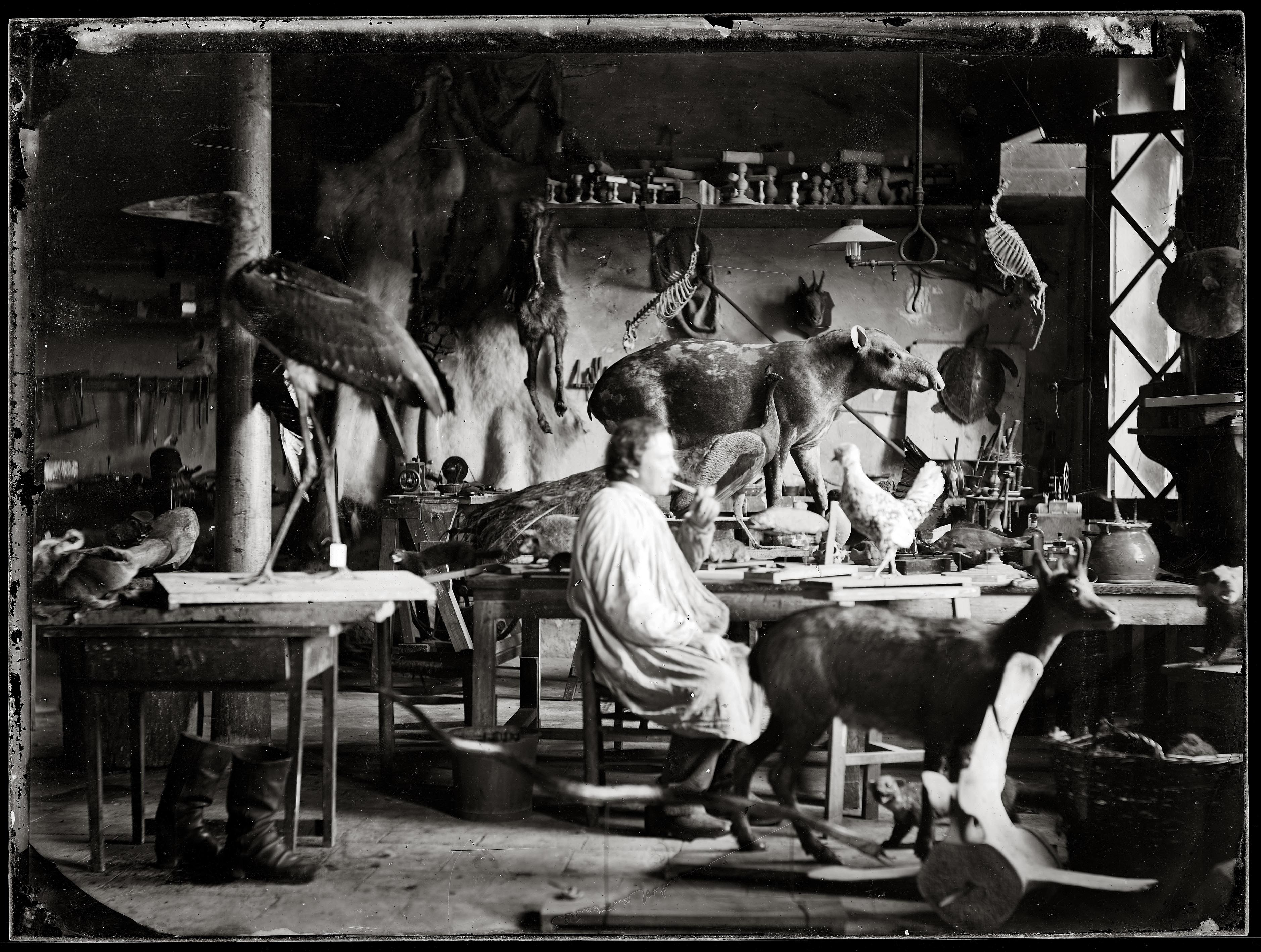 Sans inscription ni mention d'auteur.